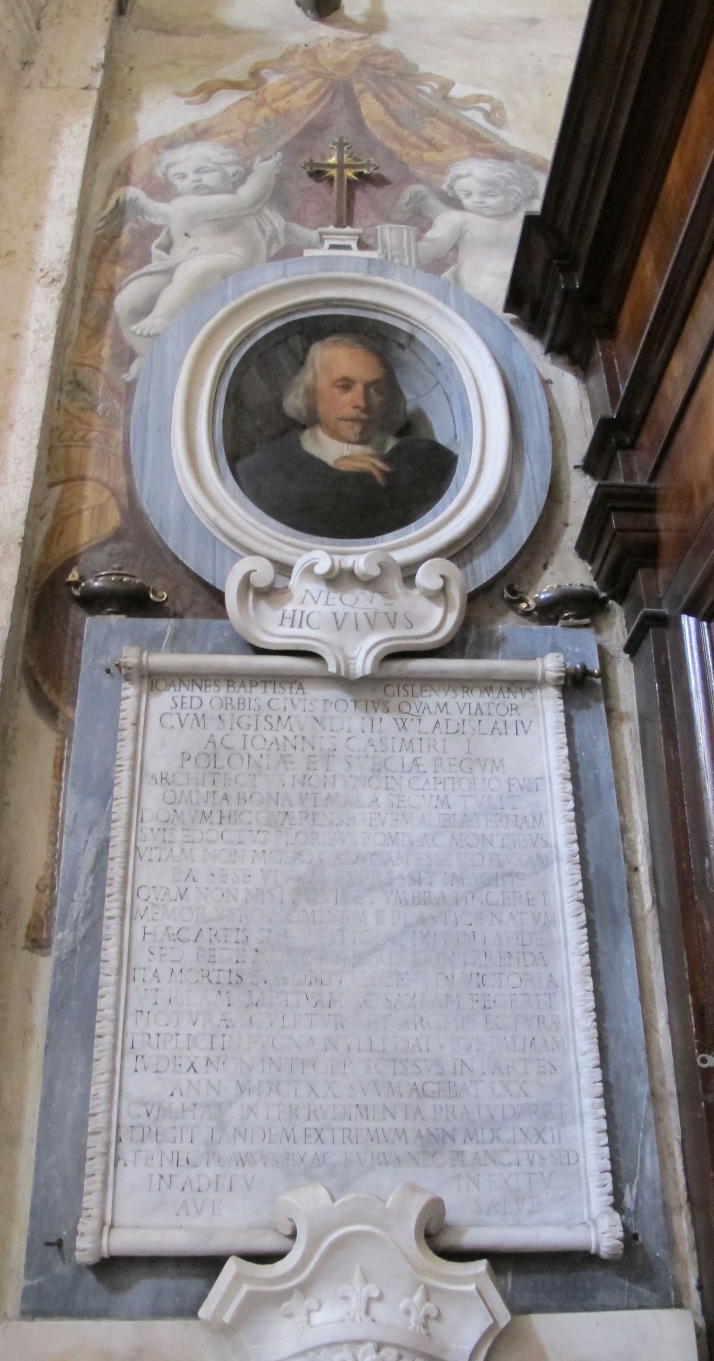 Santa maria del popolo, monum a giovanni battista gisleni